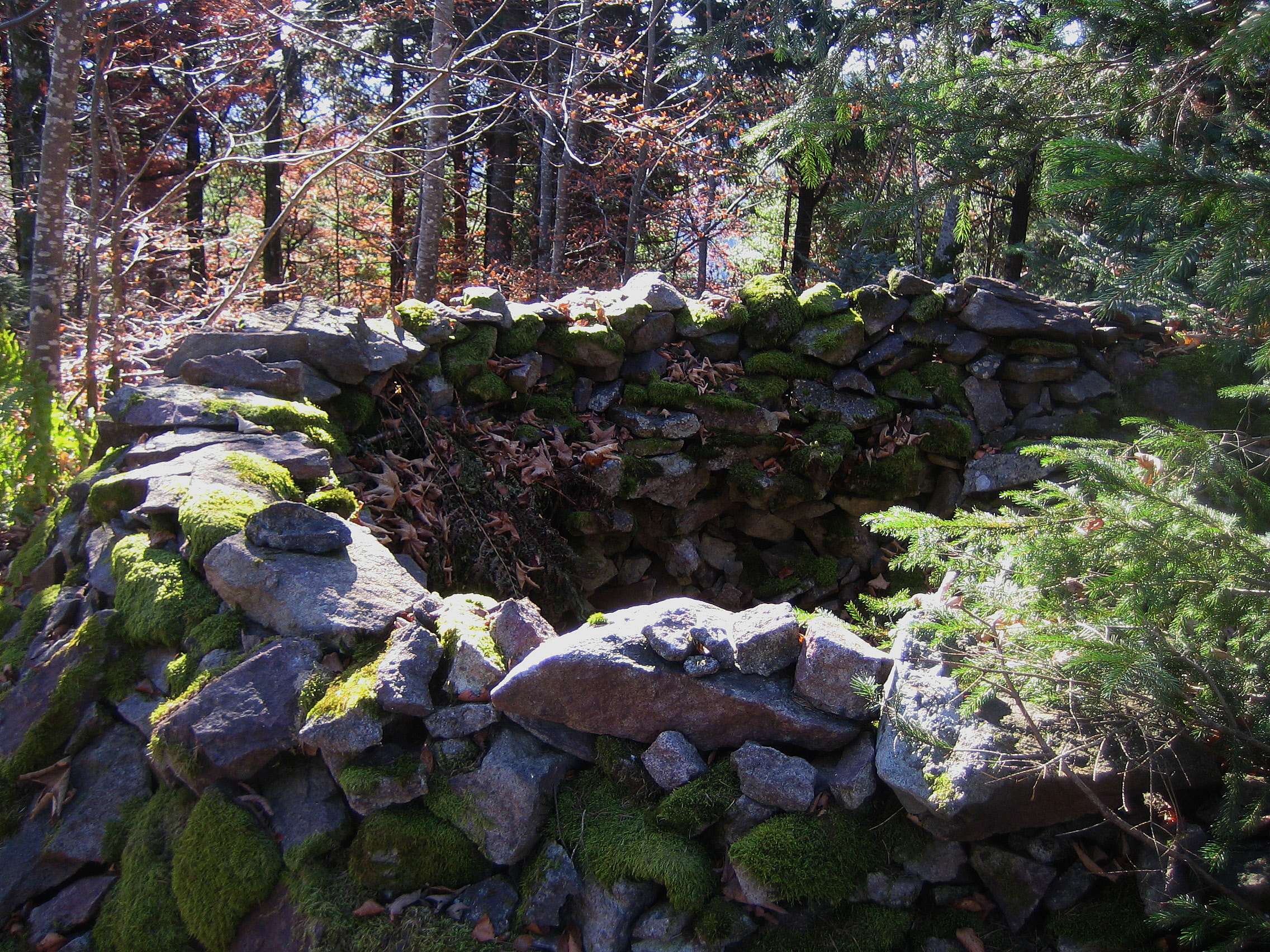 Mauerreste auf dem Stockberg bei Marzell